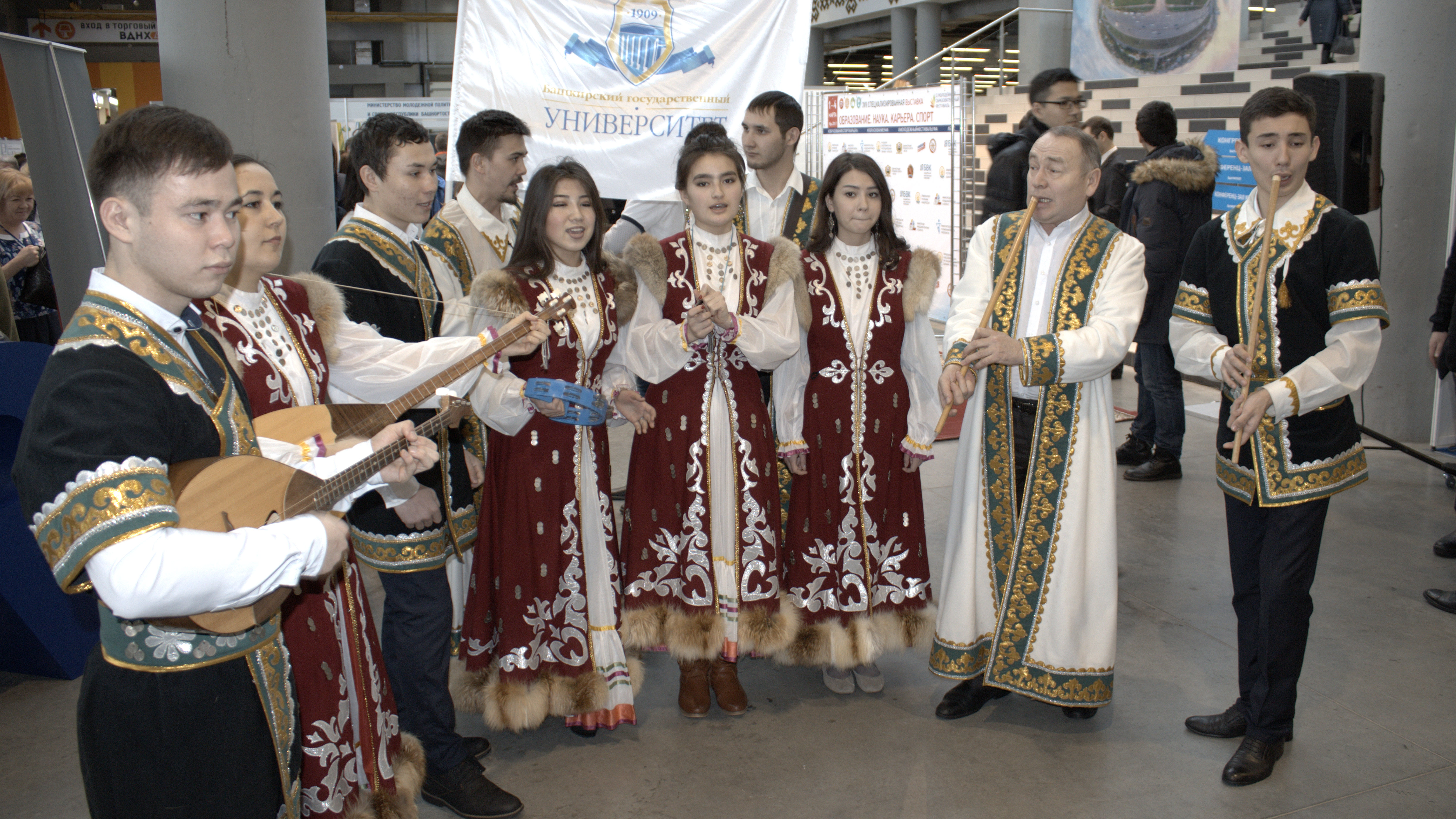 Фольклорный ансамбль Башкирского государственного университета (Уфа)